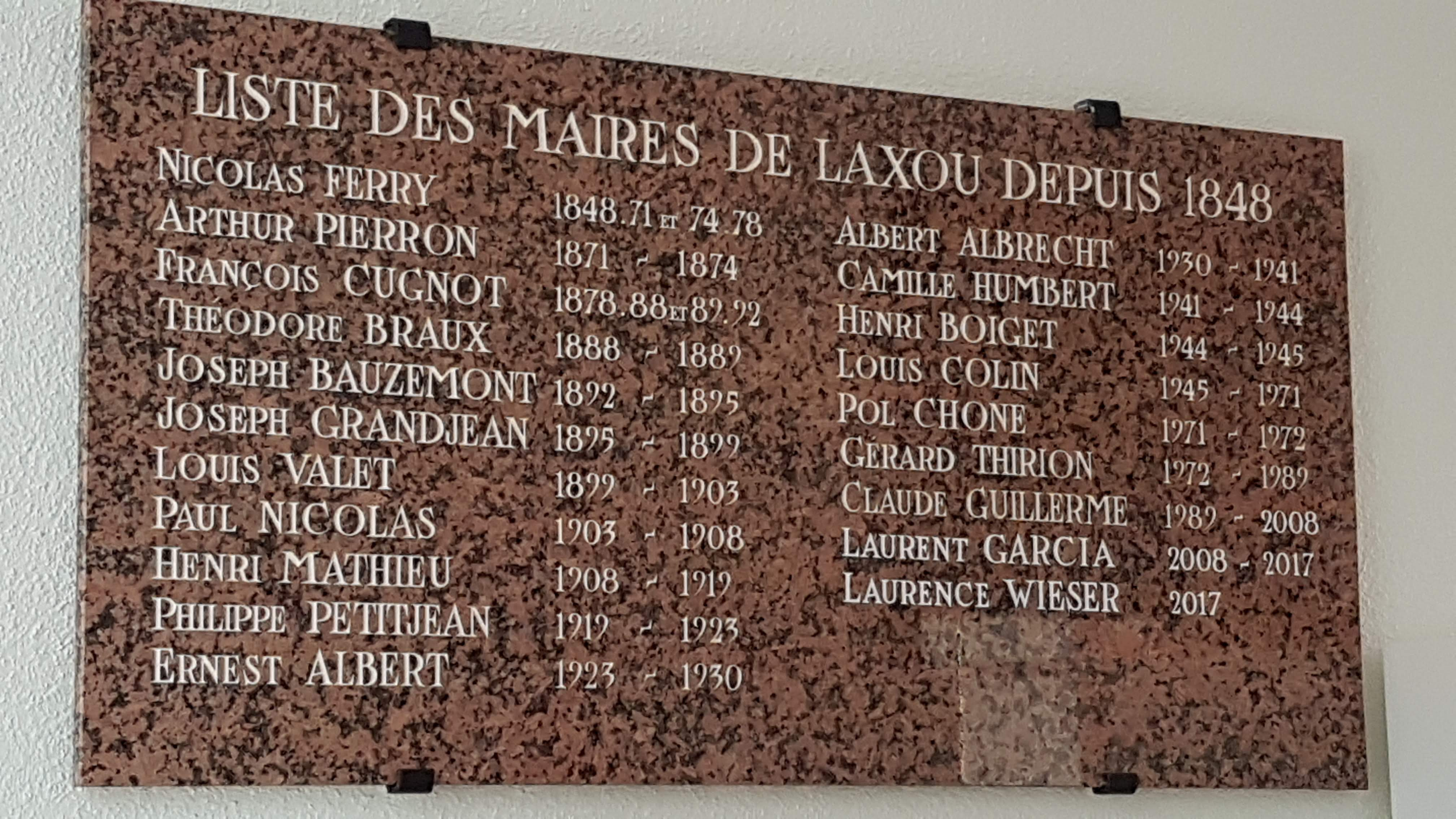 Plaques accroché à la Mairie de Laxou